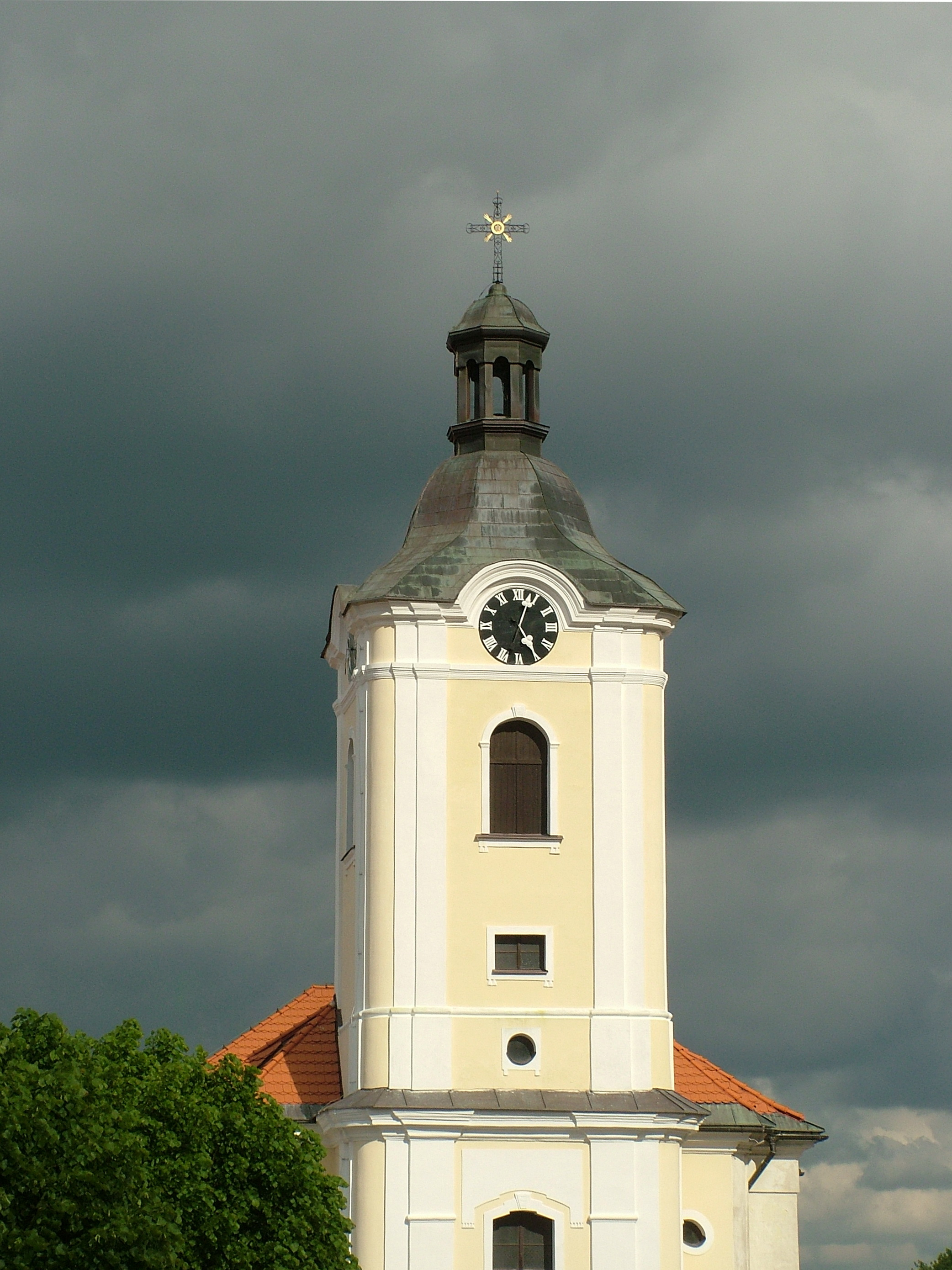 Kostel sv. Bartoloměje (Divišov), náměstí, Divišov